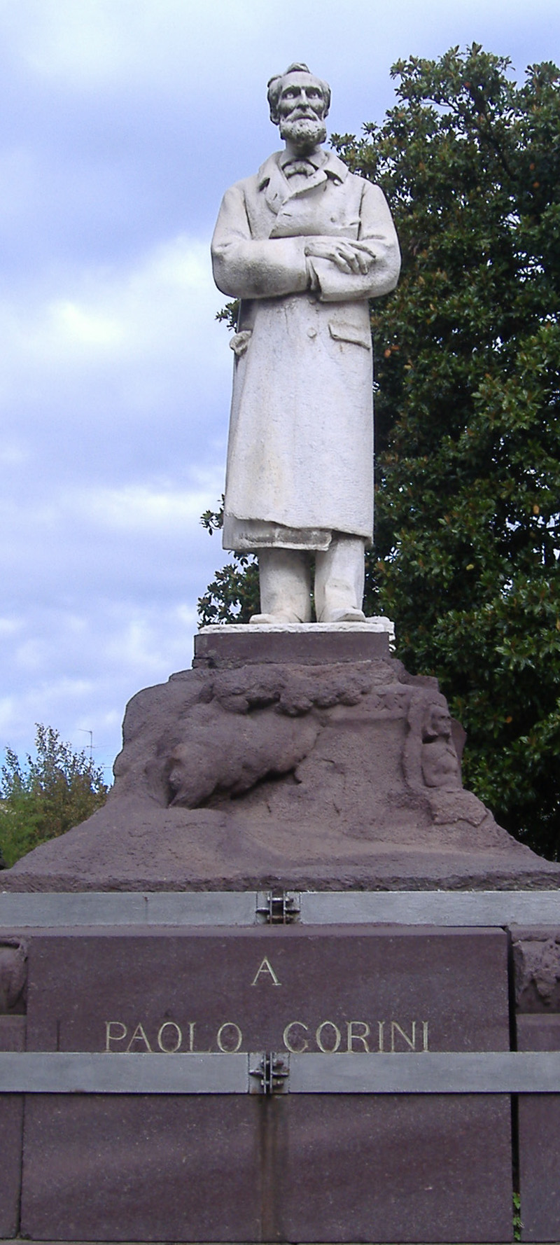 Paolo Gorini Monument - Lodi - Italy